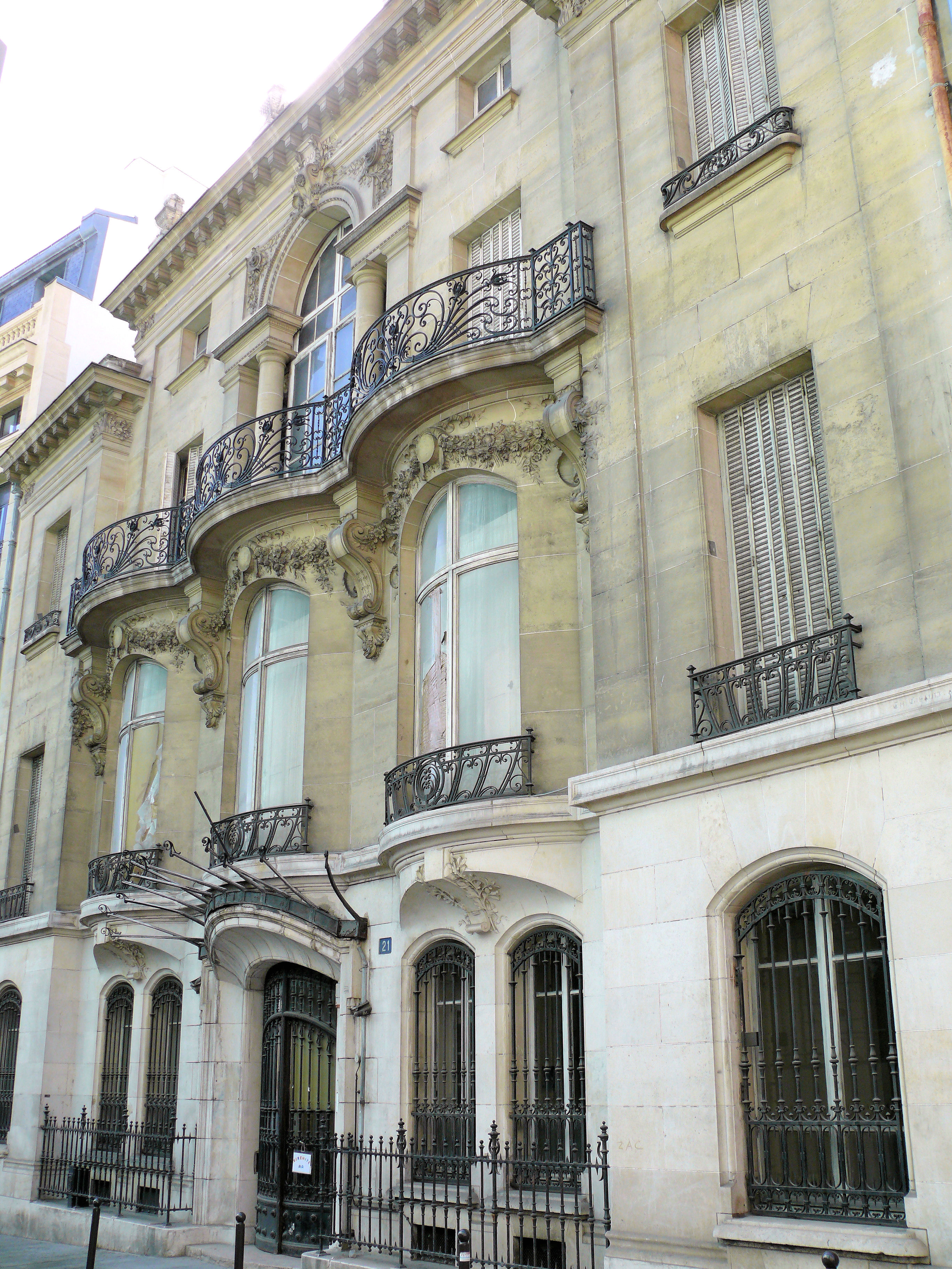 Paris 9ème arrondissement - Hôtel de Choudens